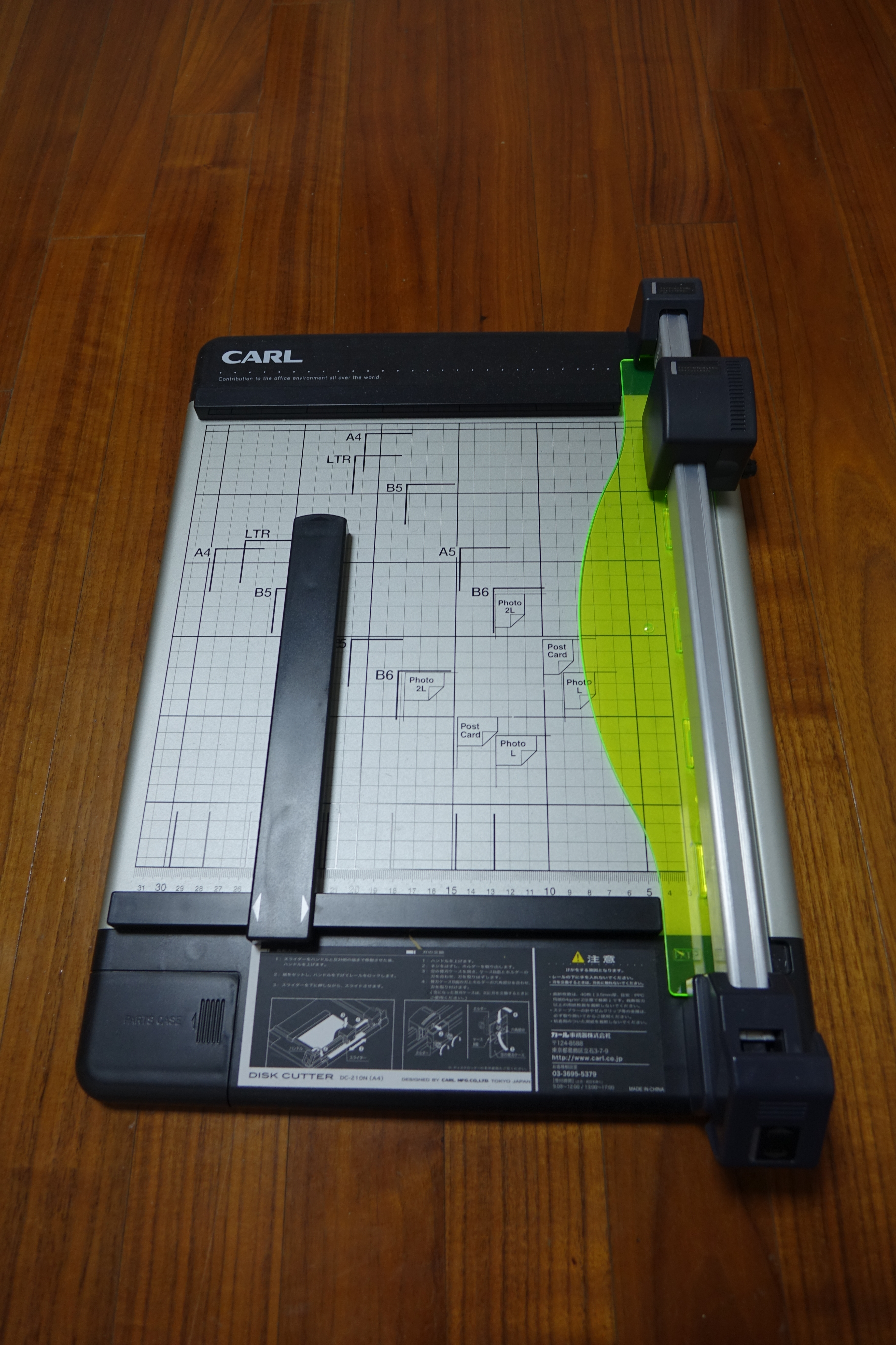 CARL 재단기